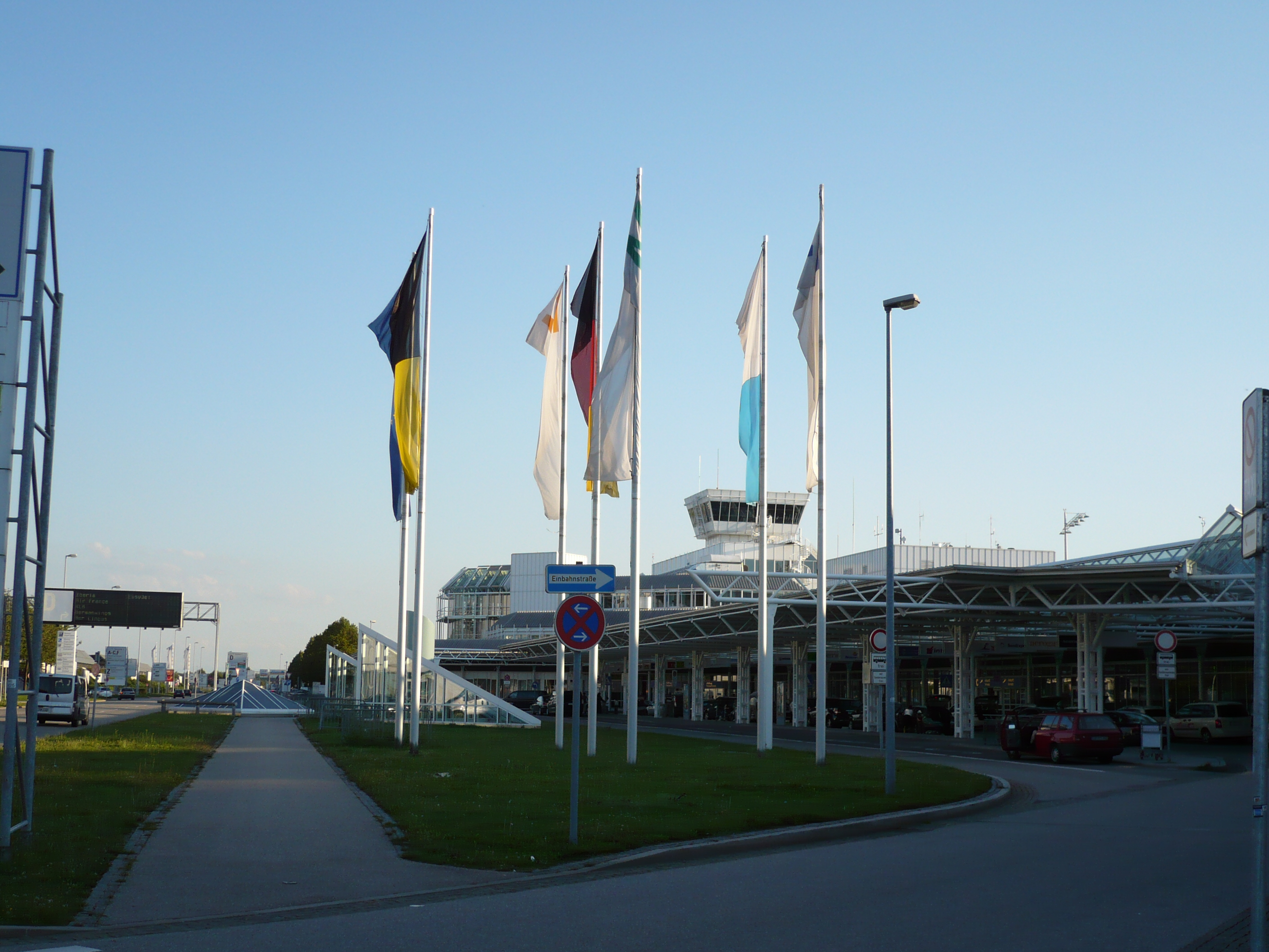 Vorfahrt zum Terminal 1 C des Flughafen Münchens